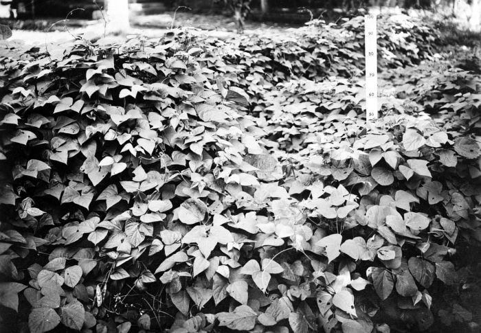 Repronegatief. Groene bemesters. Bodemdek van kratok (Phaseolus lunatus) 4 maanden oud, proeftuin Tjiomas van het W.J.R. Proefstation Buitenzorg